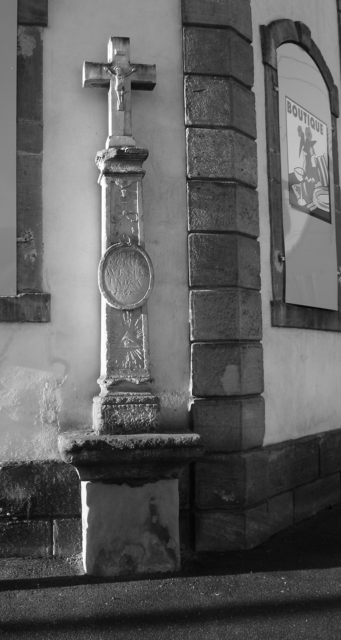 croix de carrefour en grès, place de la Libération, à Raon-l'Étape (88372)